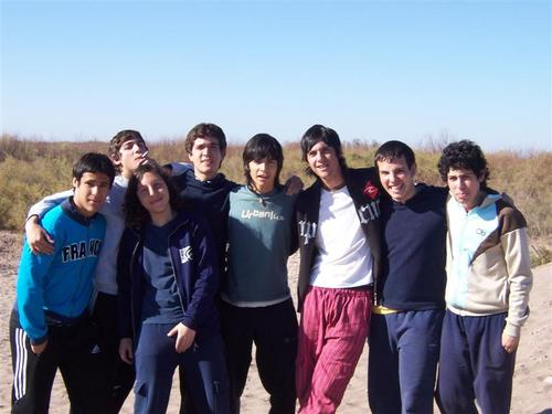 fotografia de miembros de Panplete